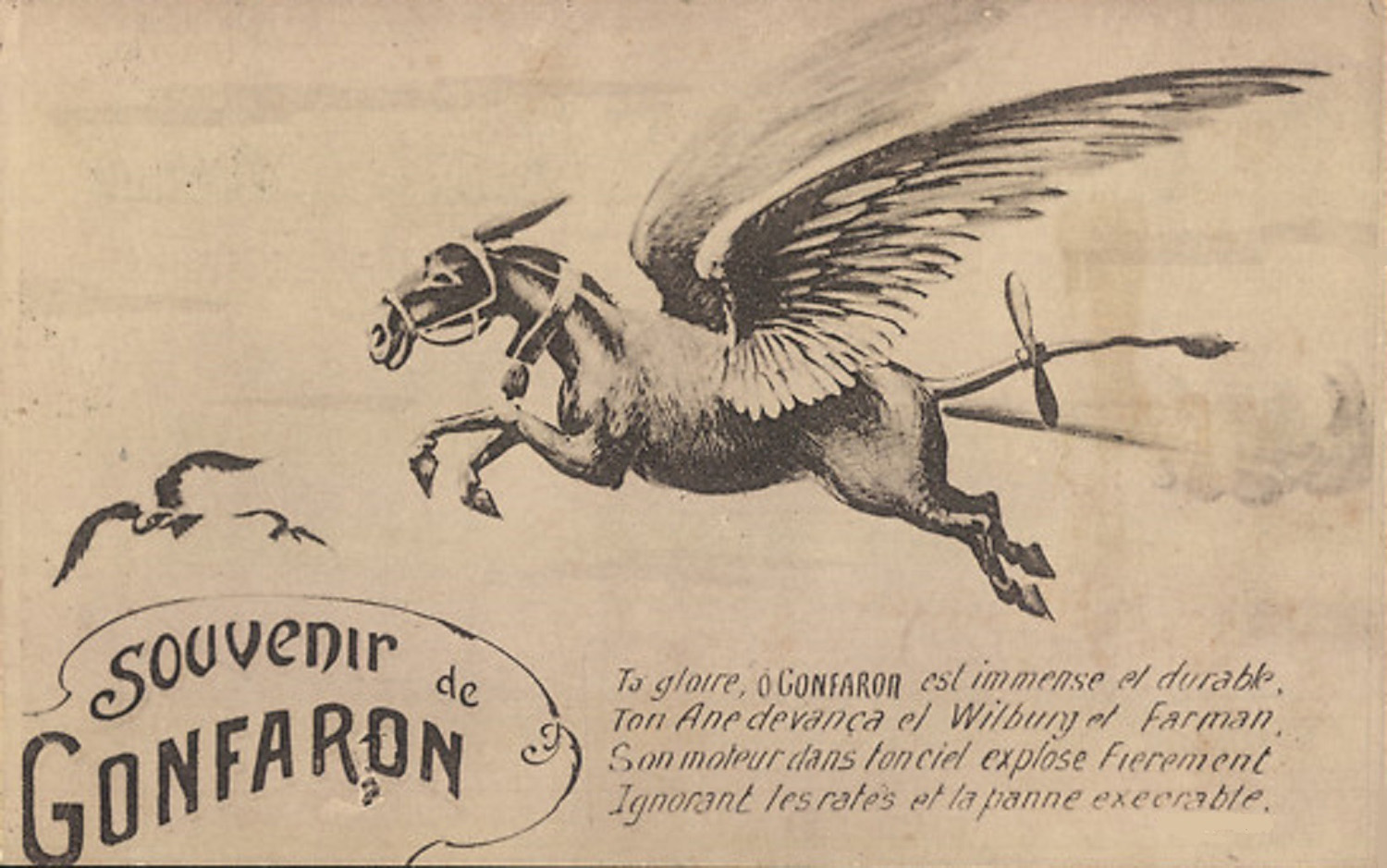 Gonfaron le pays où les ânes volent